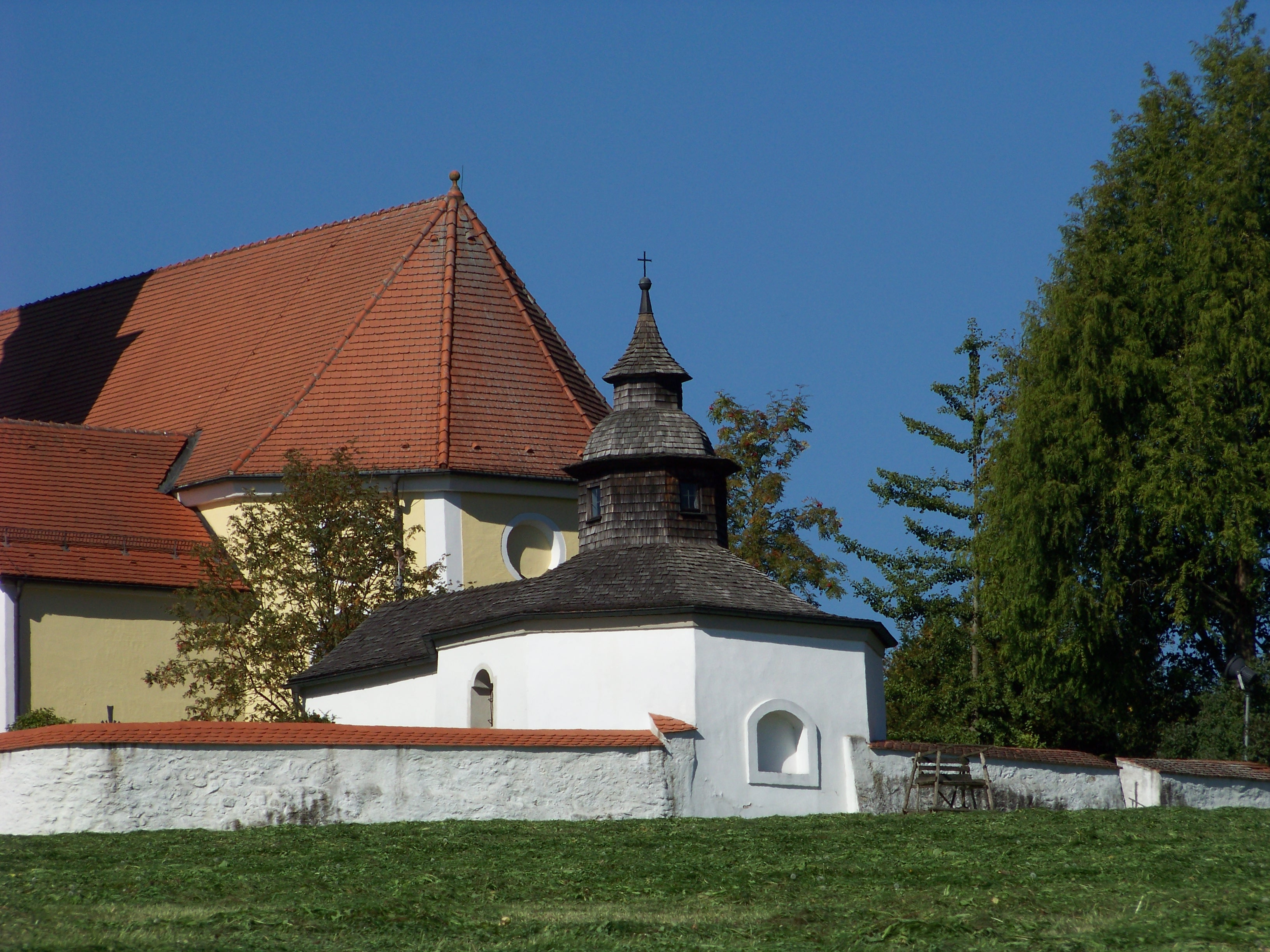 Haselbach, Straubinger Straße 17. Totentanzkapelle. Achteckiger Zentralbau mit Vorhalle, und Dachreiter, erbaut um 1670; mit Ausstattung.